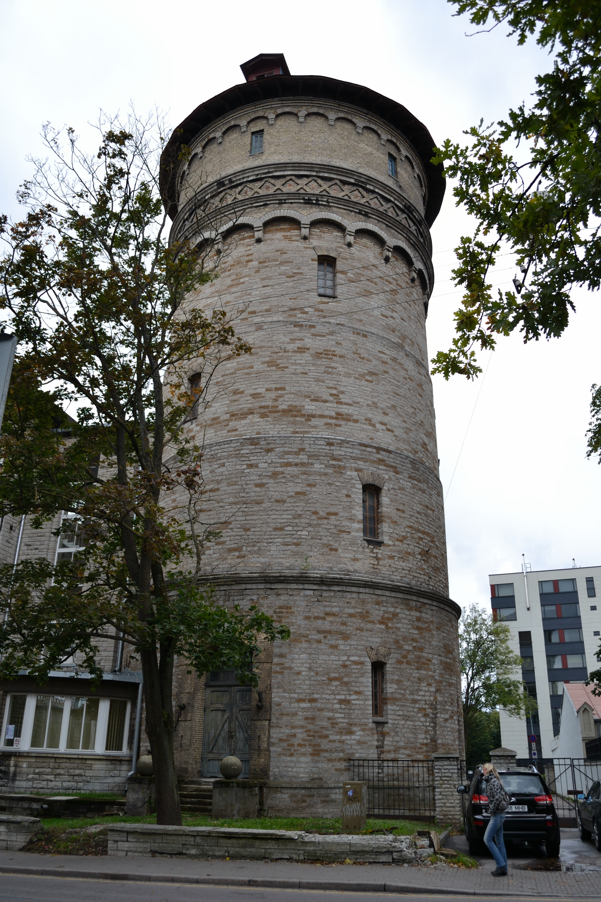 Tallinn, koolihoone veetorniga Tõnismägi 12, 14